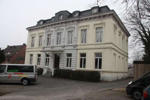 Das Haus Paulstr. 71 in Merken